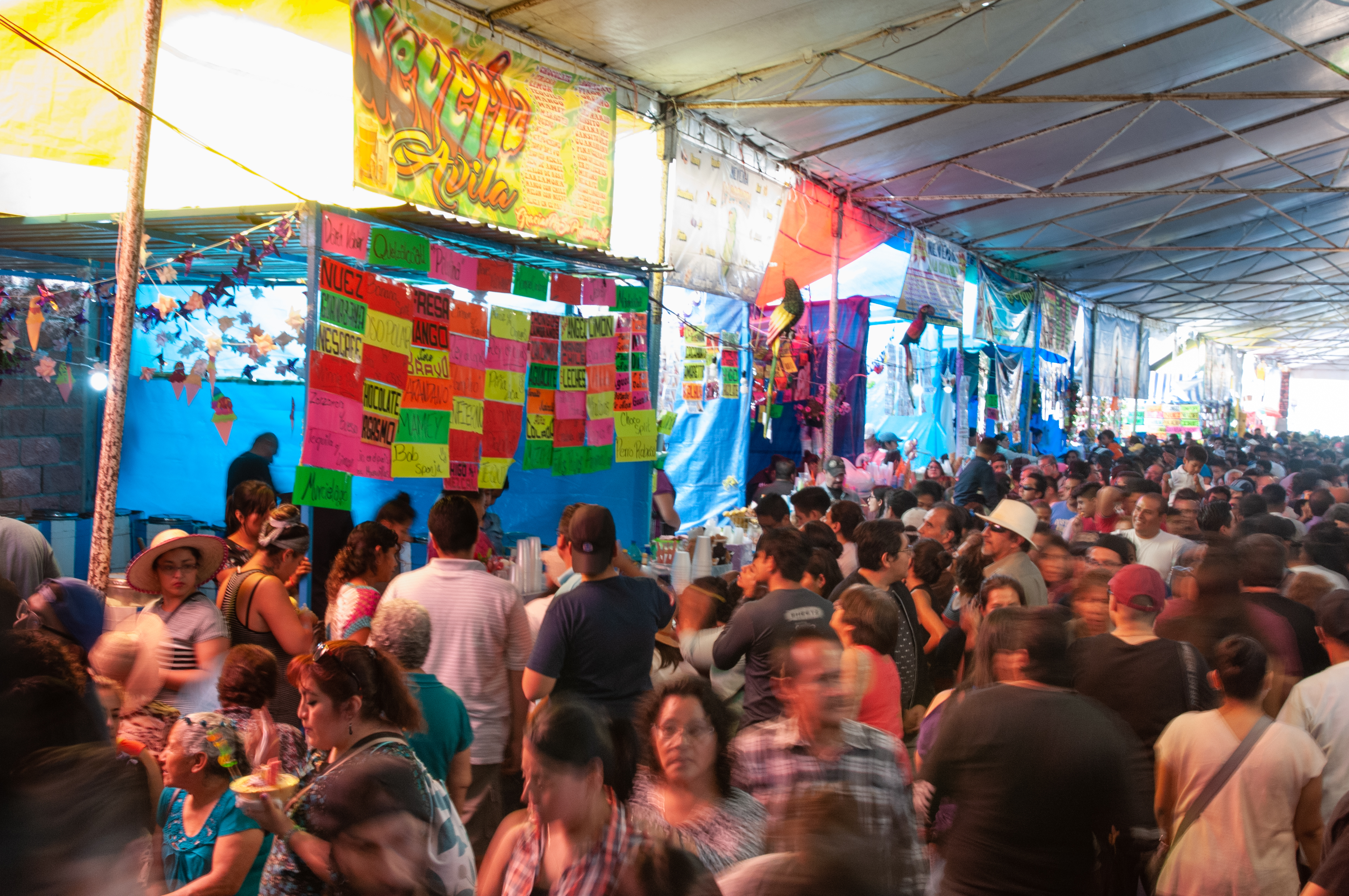 Vista general de los locales y asistentes a la Feria. La Feria de la Nieve es un evento anual de gran tradición en el pueblo de Tulyehualco, de la Alcaldía de Tláhuac, en la Ciudad de México. Existen decenas de puestos ofreciendo cientos de sabores diferentes de nieve.